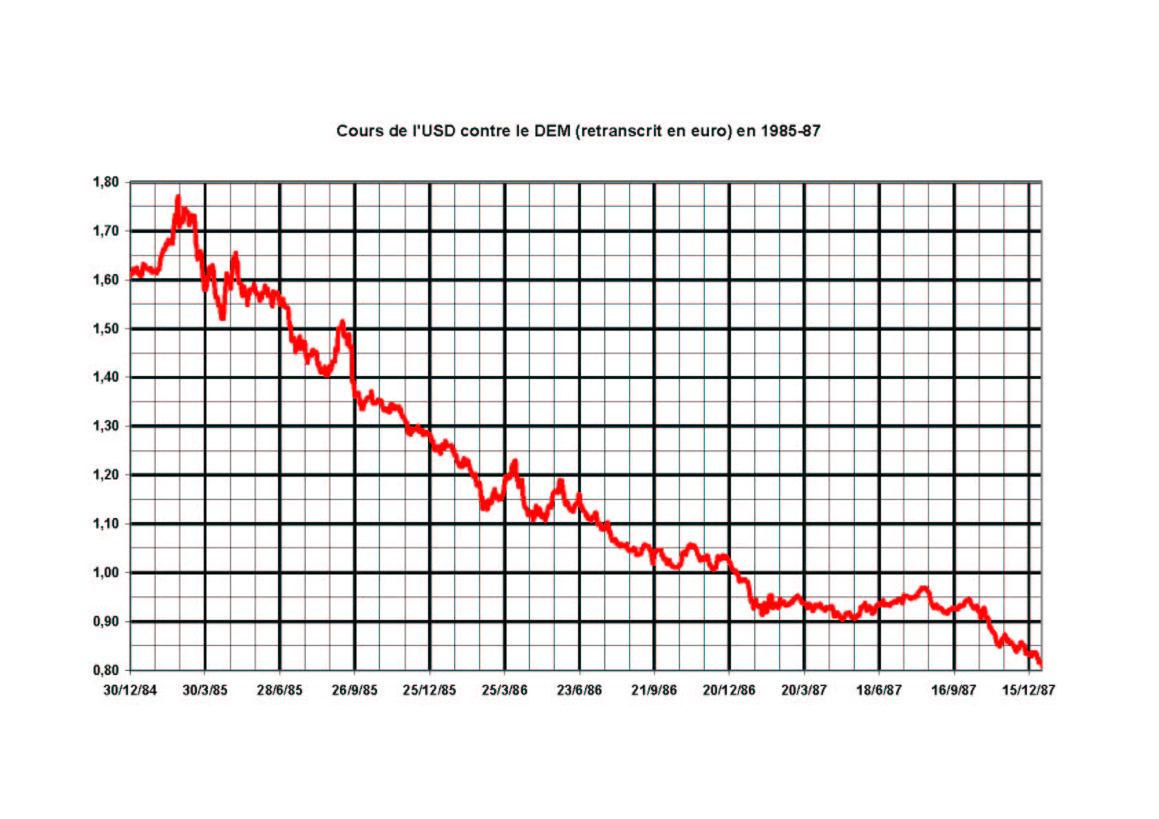 Graphique réalisé par moi même